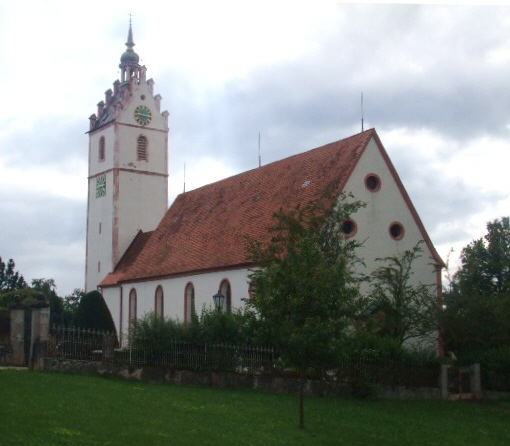 Pfarrkirche St. Peter und Paul, Benzingen, Gemeinde Winterlingen, Zollernalbkreis